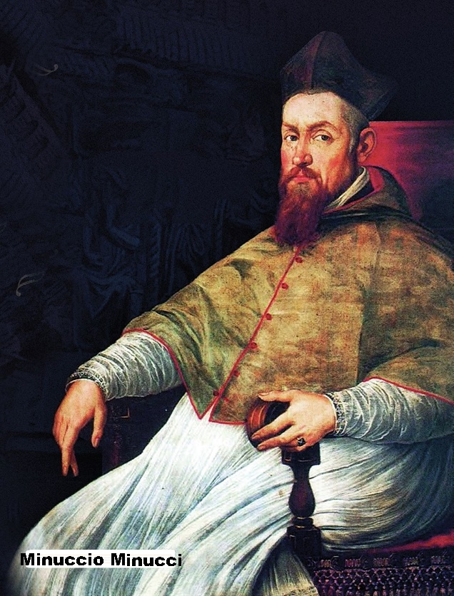 Minuccio Minucci (1551-1604) Erzbischof, Päpstlicher Nuntius in München